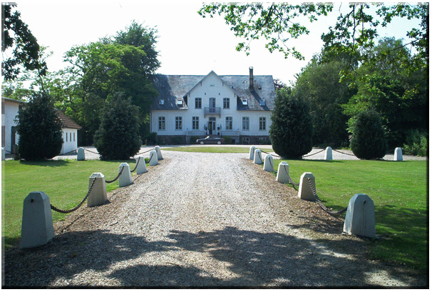 Herlevgård, Hillerød